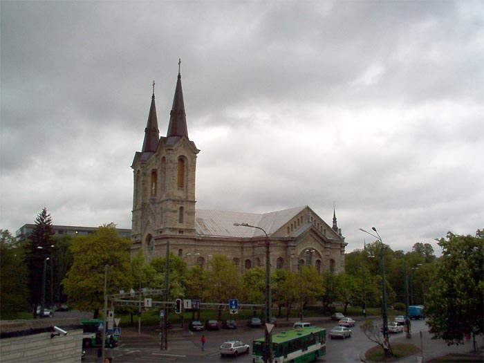 Tallinna kaarli kirik.